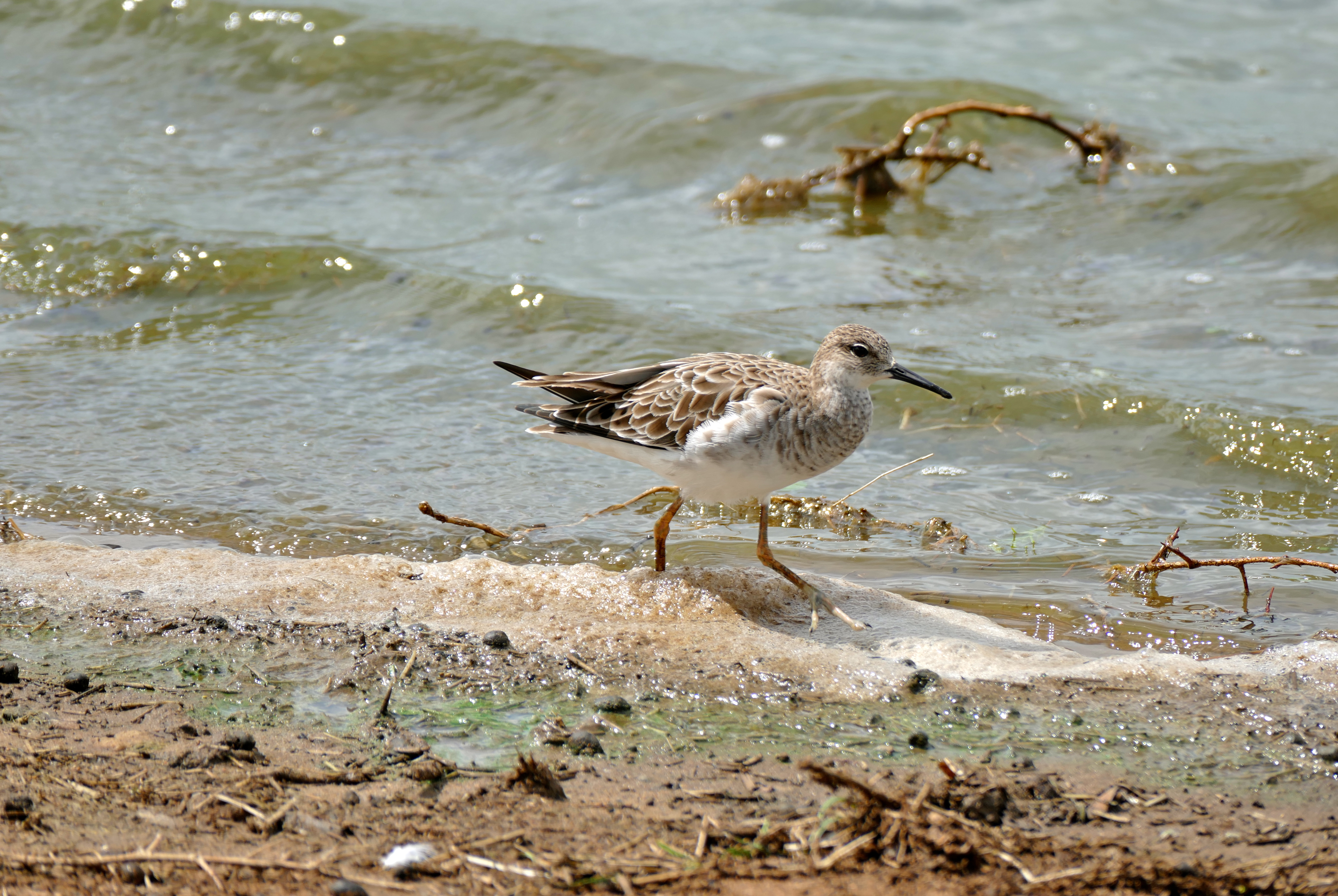 Sunset Dam, Lower Sabie, Kruger NP, SOUTH AFRICA